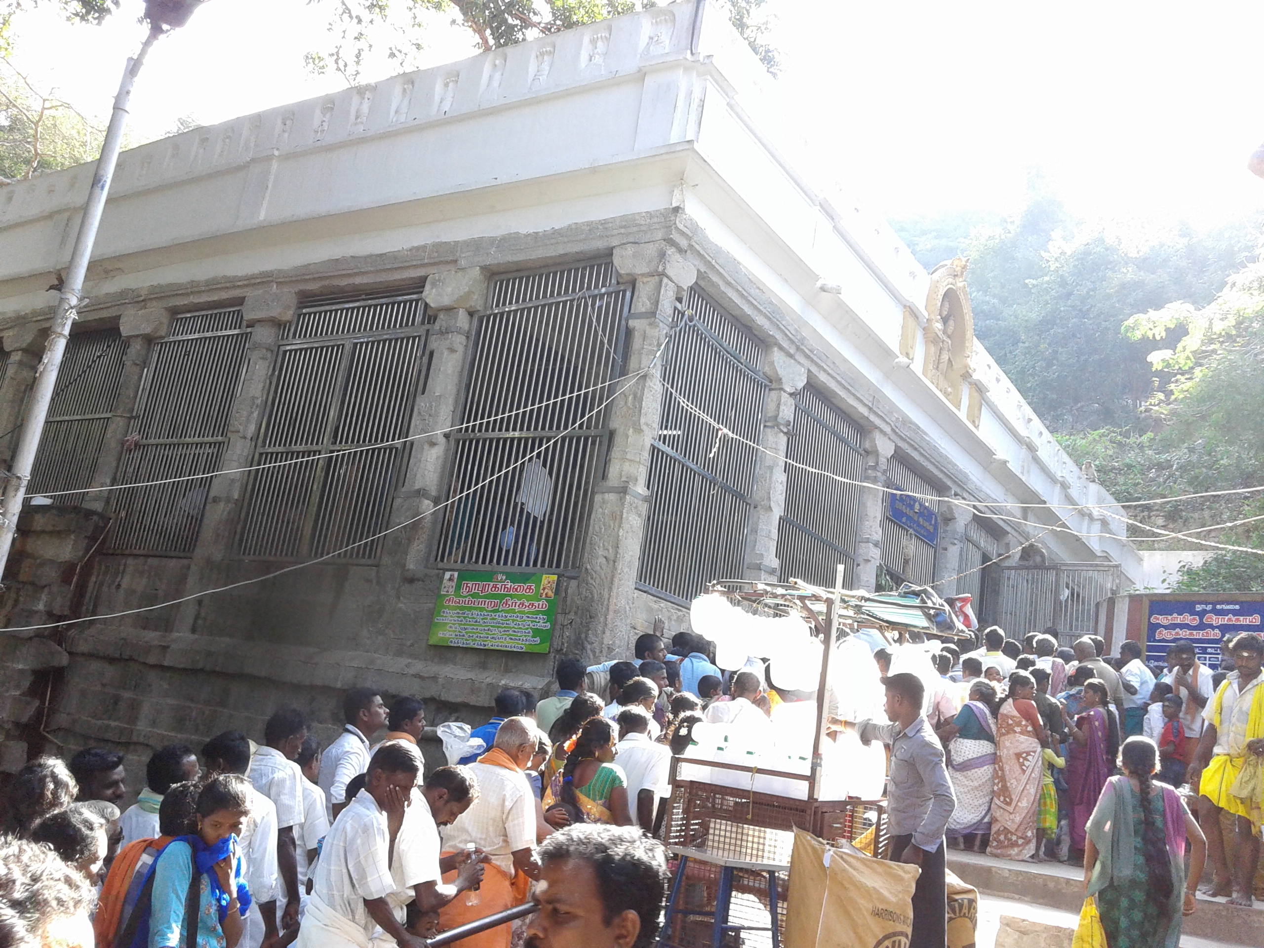 ராக்காயி கோவில்